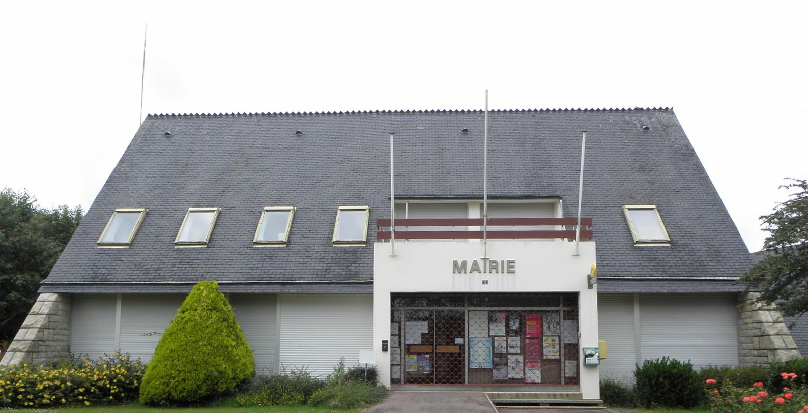 Mairie de Dinéault (29).